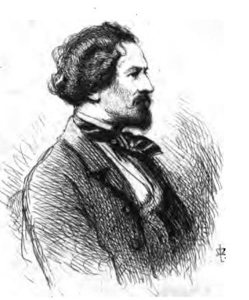 Frederick Locker. Zeichnung von by John Everett Millais. J. Millais, etching, repro. in Moxon's Miniature poets